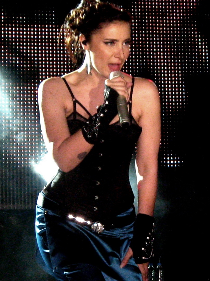 Türk şarkıcı Sıla, Bahçeşehir Üniversitesi'nin 2011 yılındaki bahar şenliklerinde sahnede.